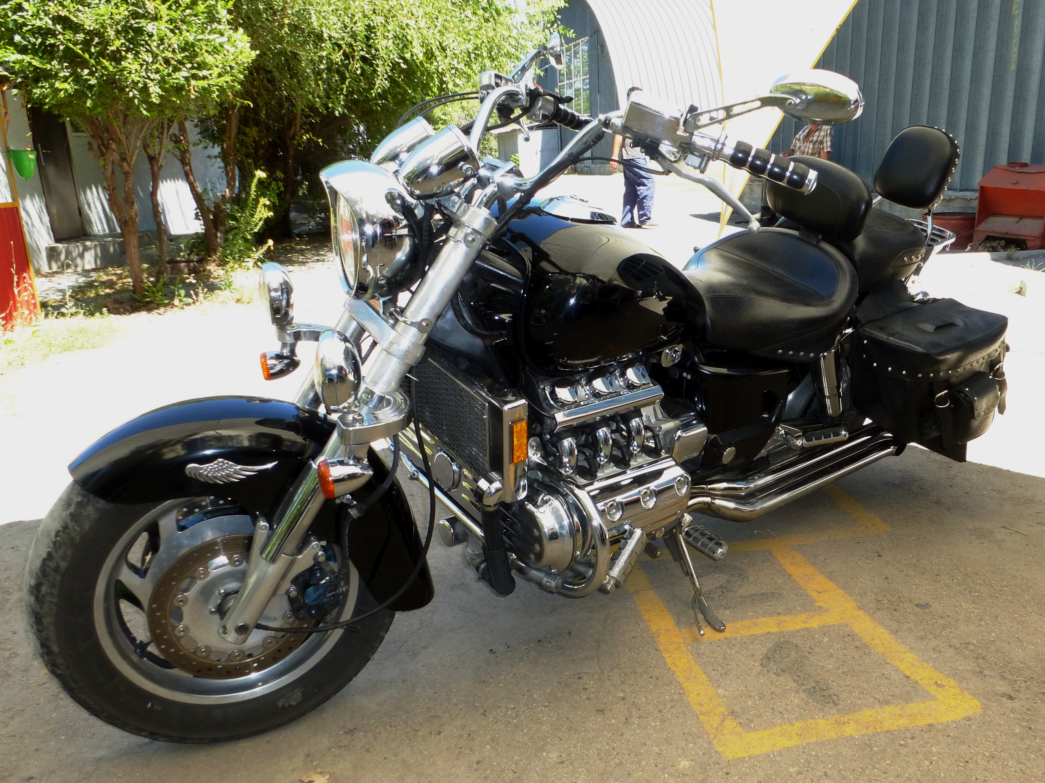 Мотоцикл Honda F6C Valkyrie c 6-цилиндровым двигателем